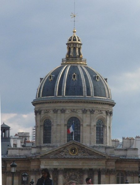 Coupole de l'Institut de France vue du pont des Arts (Paris)